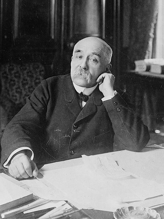 El político y primer ministro francés, Georges Clemenceau.